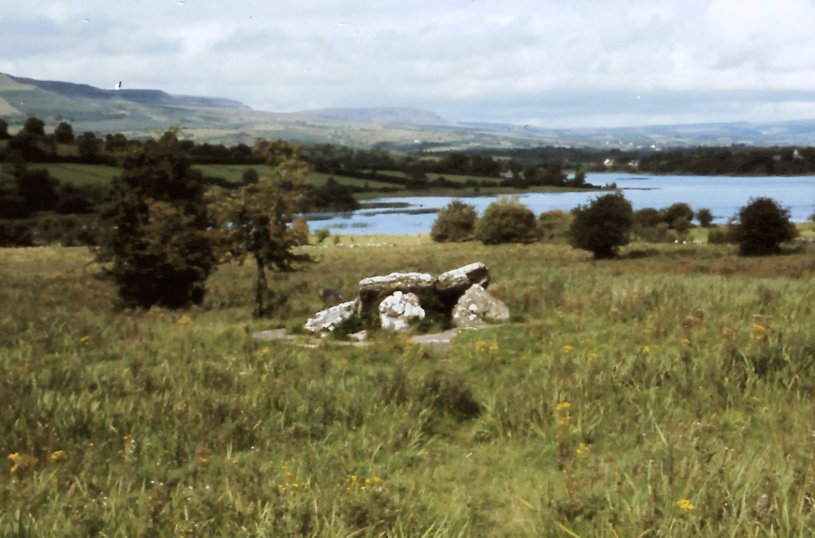 Loughscur Dolmen